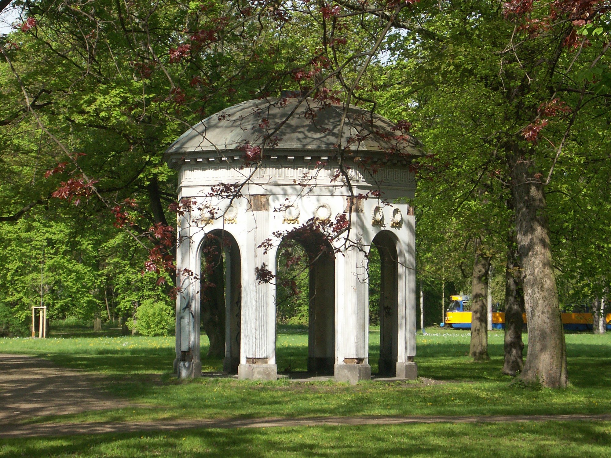 Pavillon im Leipziger Clara-Zetkin-Park (Parkteil König-Albert-Park) aus dem ehemaligen Gerhards Garten (dort Sonnentempel)